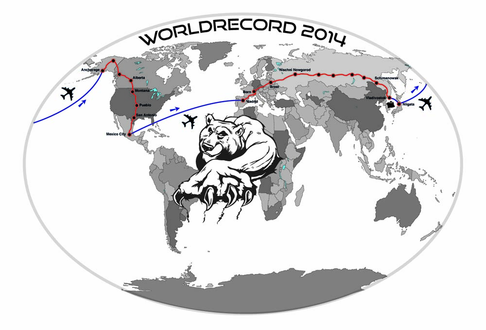 Karte_Weltrekord_2014.jpg